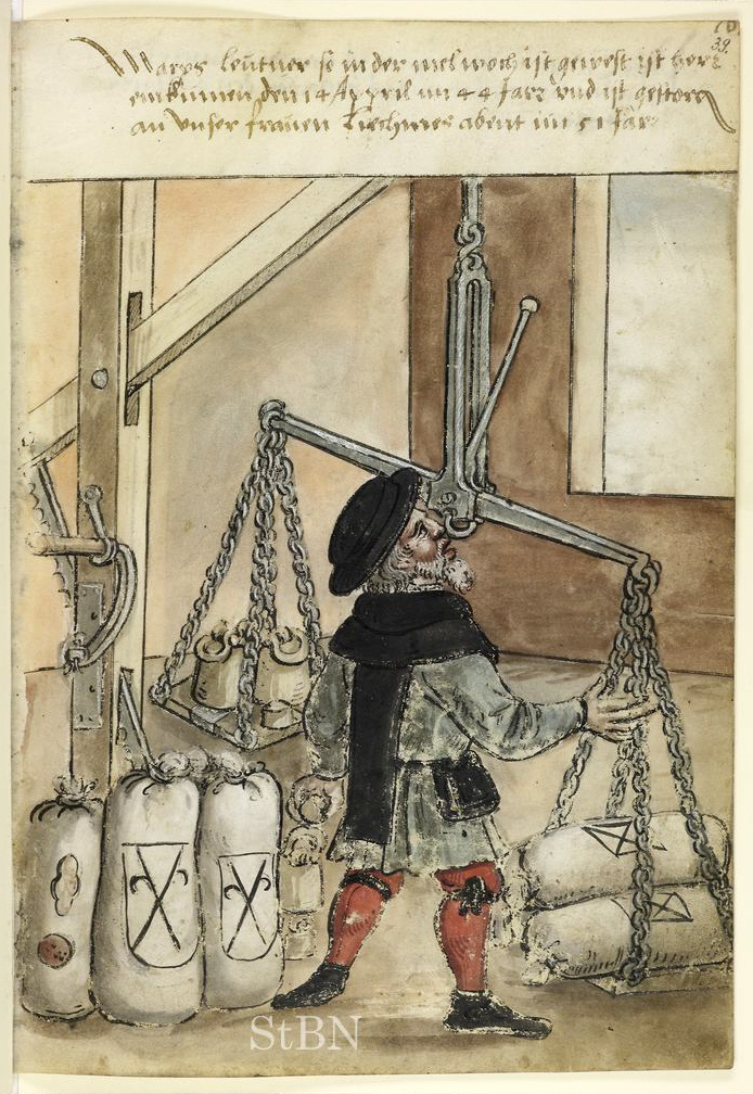 Transkription und weitere Informationen Marxs (Marx) Leutner, -- (Mehlwäger) Datierung: 1551